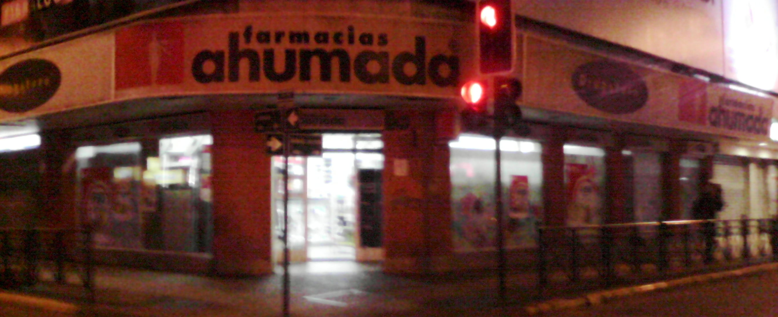 Sucursal de la cadena chilena de Farmacias Ahumada, ubicada en la calle Manuel Bulnes 413, Temuco (actualmente desaparecida).